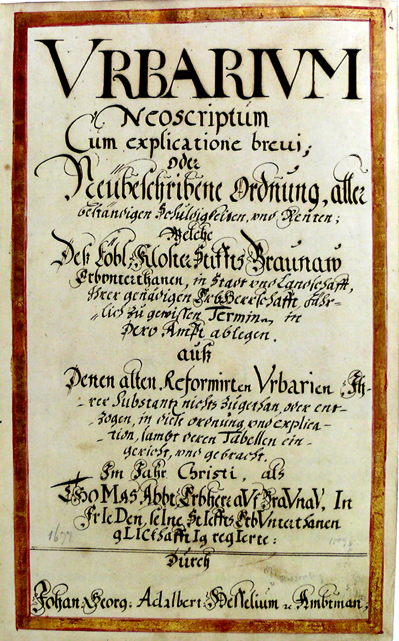 Hesseliův Urbář